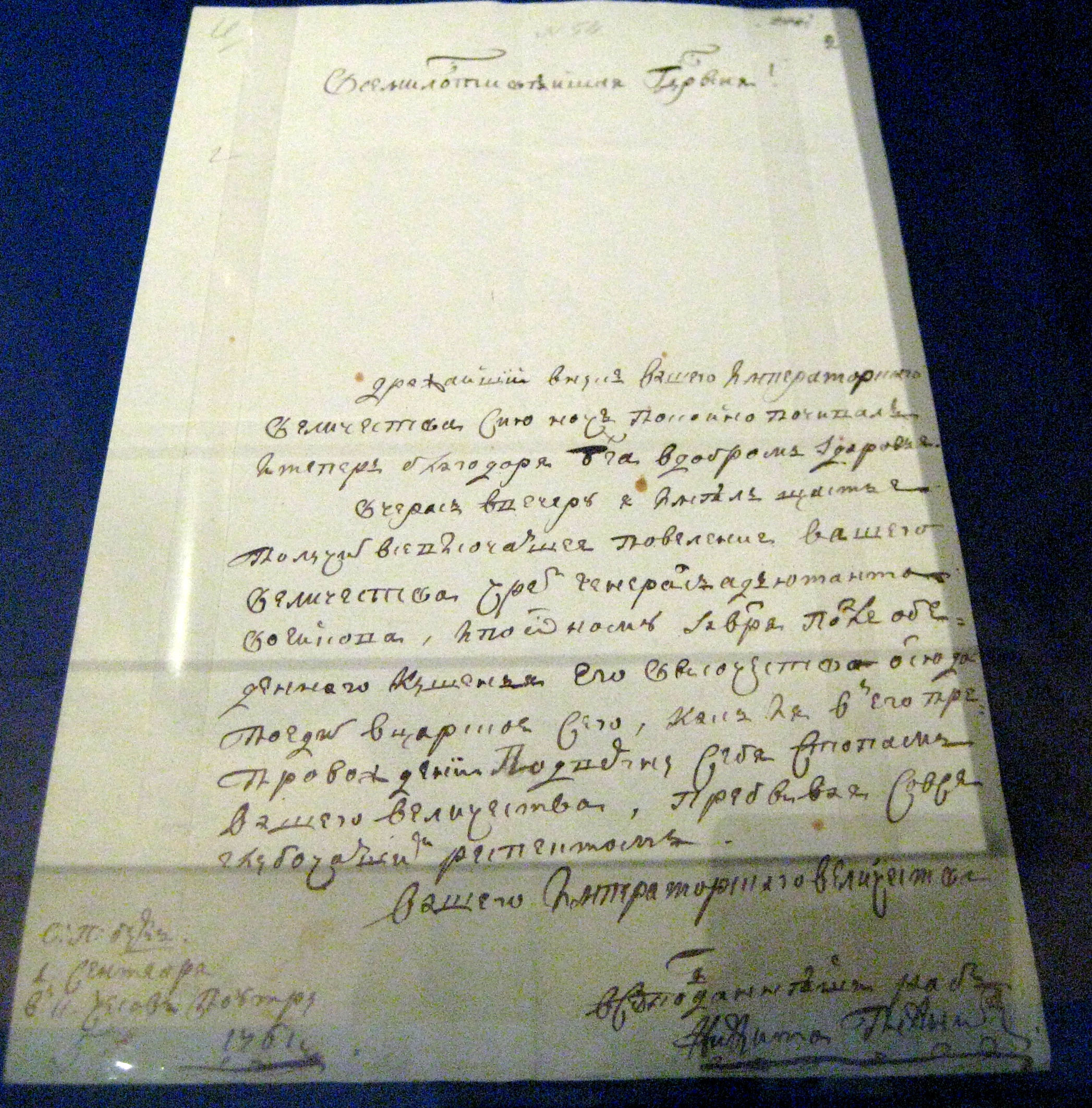 Письмо Н.И. Панина императрице Елизавете о вел. кн. Петре Алексеевиче. 1 сентября 1761. РГАДА